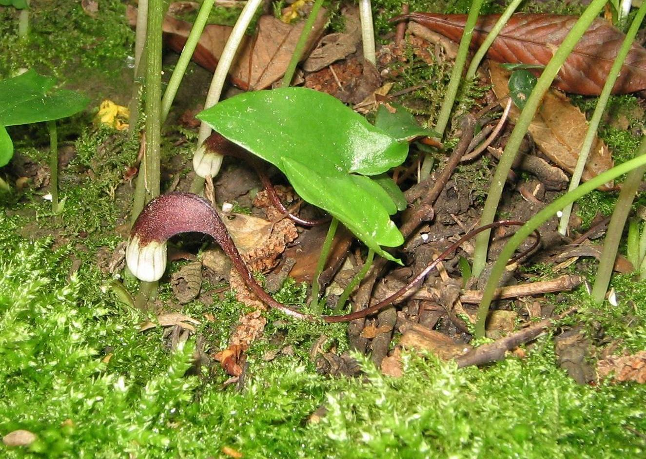 Arisarum proboscideum (détail)